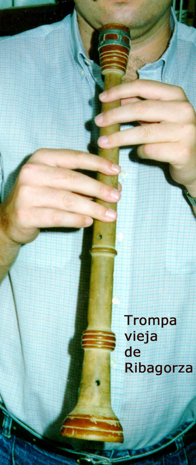 Trompa de Ribagorça